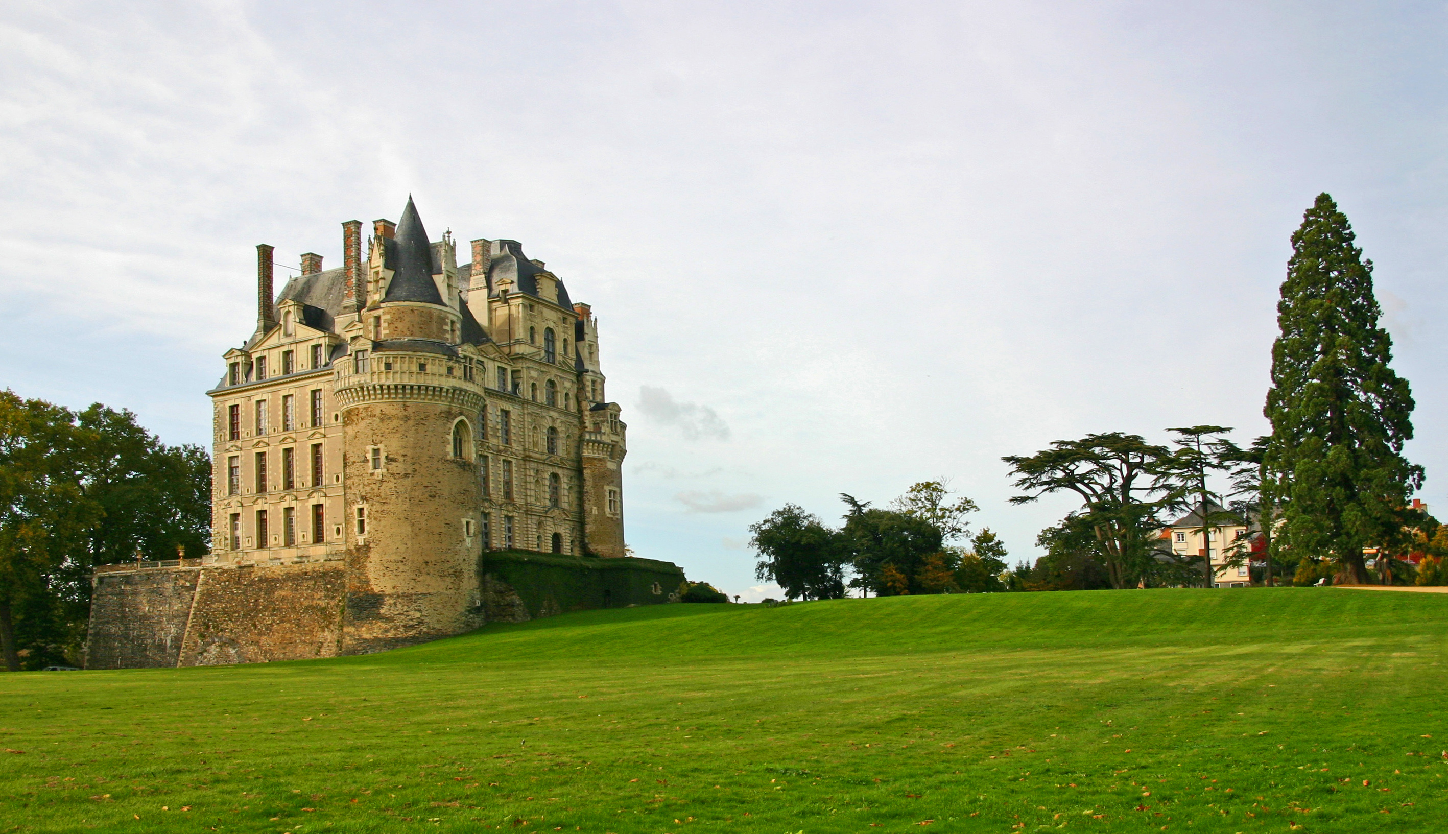 Schloss Brissac